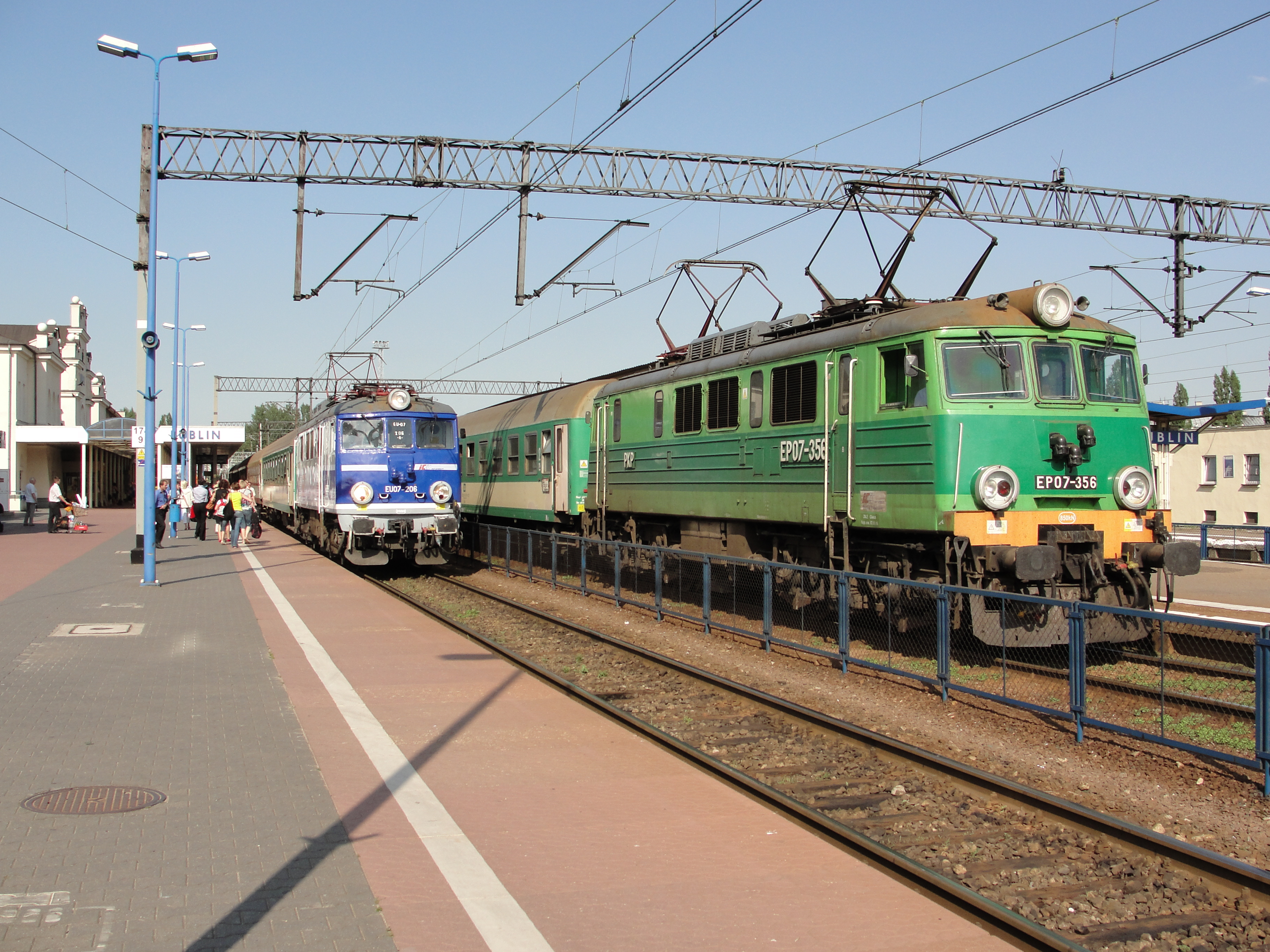 EU07-206 i EP07-356 ze składami TLK na Stacji Lublin